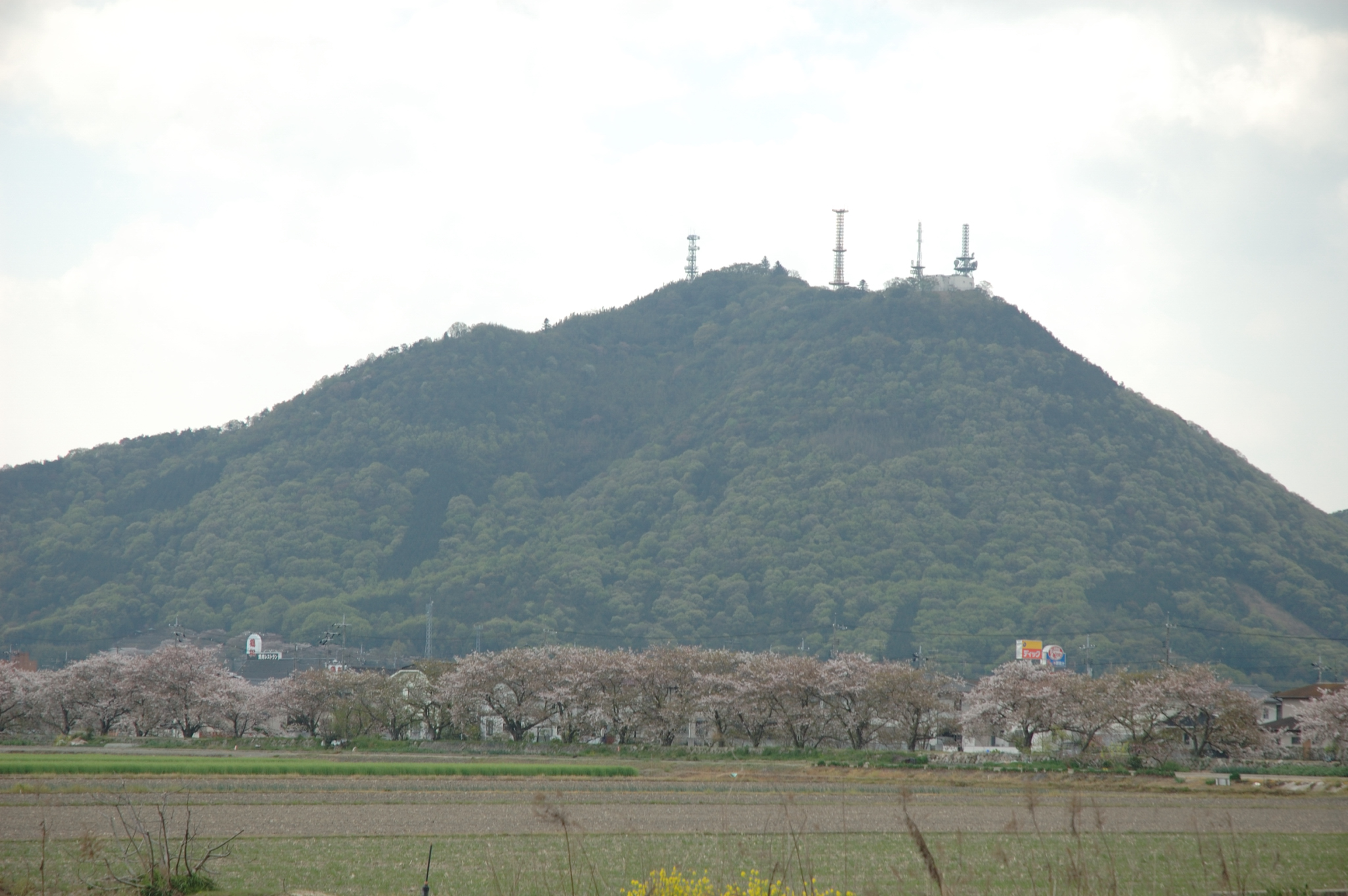 常山を北北東から望む。常山は岡山県岡山市南区および玉野市の境に位置する。